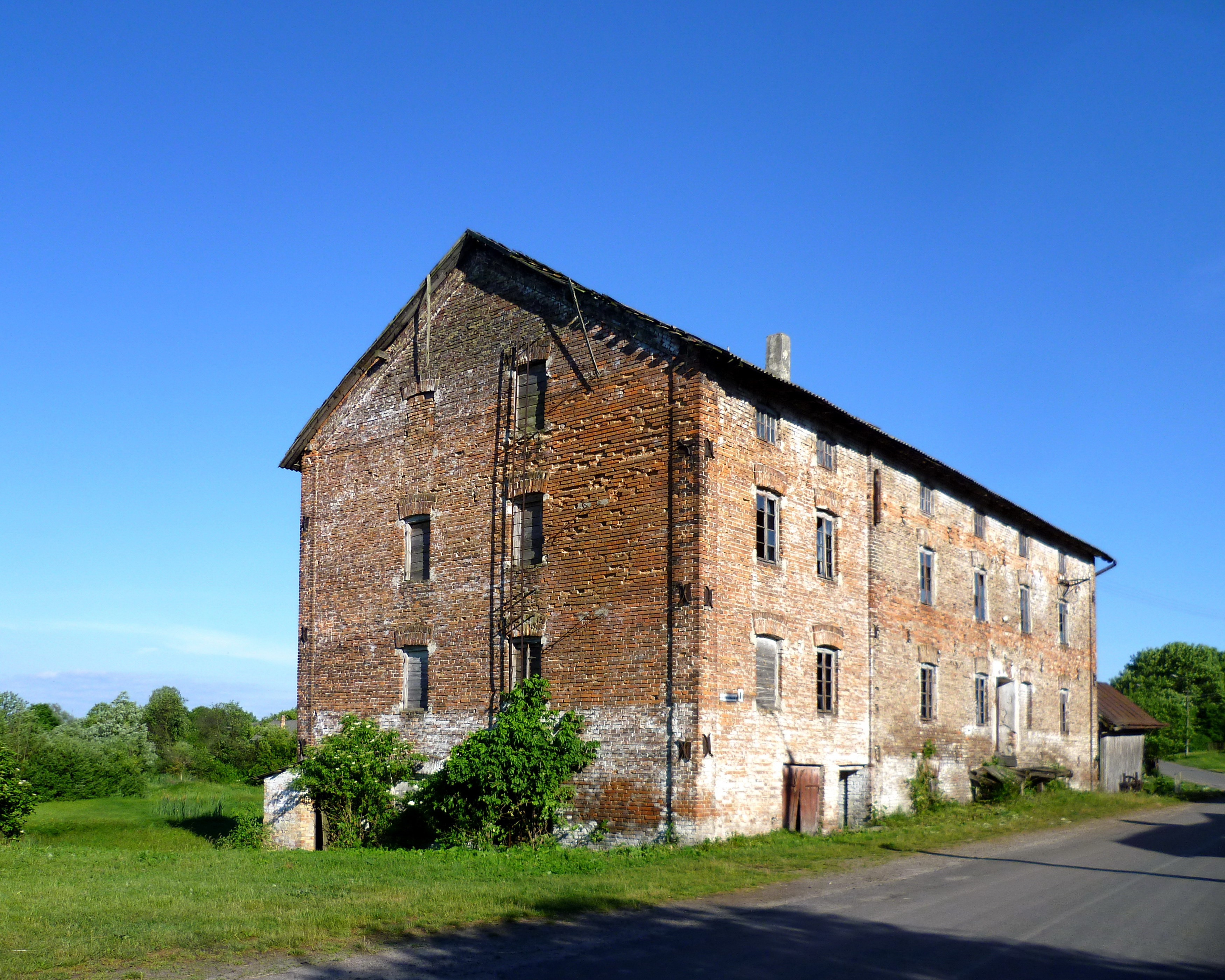 Млин водяний (2 половина ХІХ ст.) - загальний вигляд - в м.Угневі (вул. Б.Хмельницького, 1) Сокальського району Львівської області України